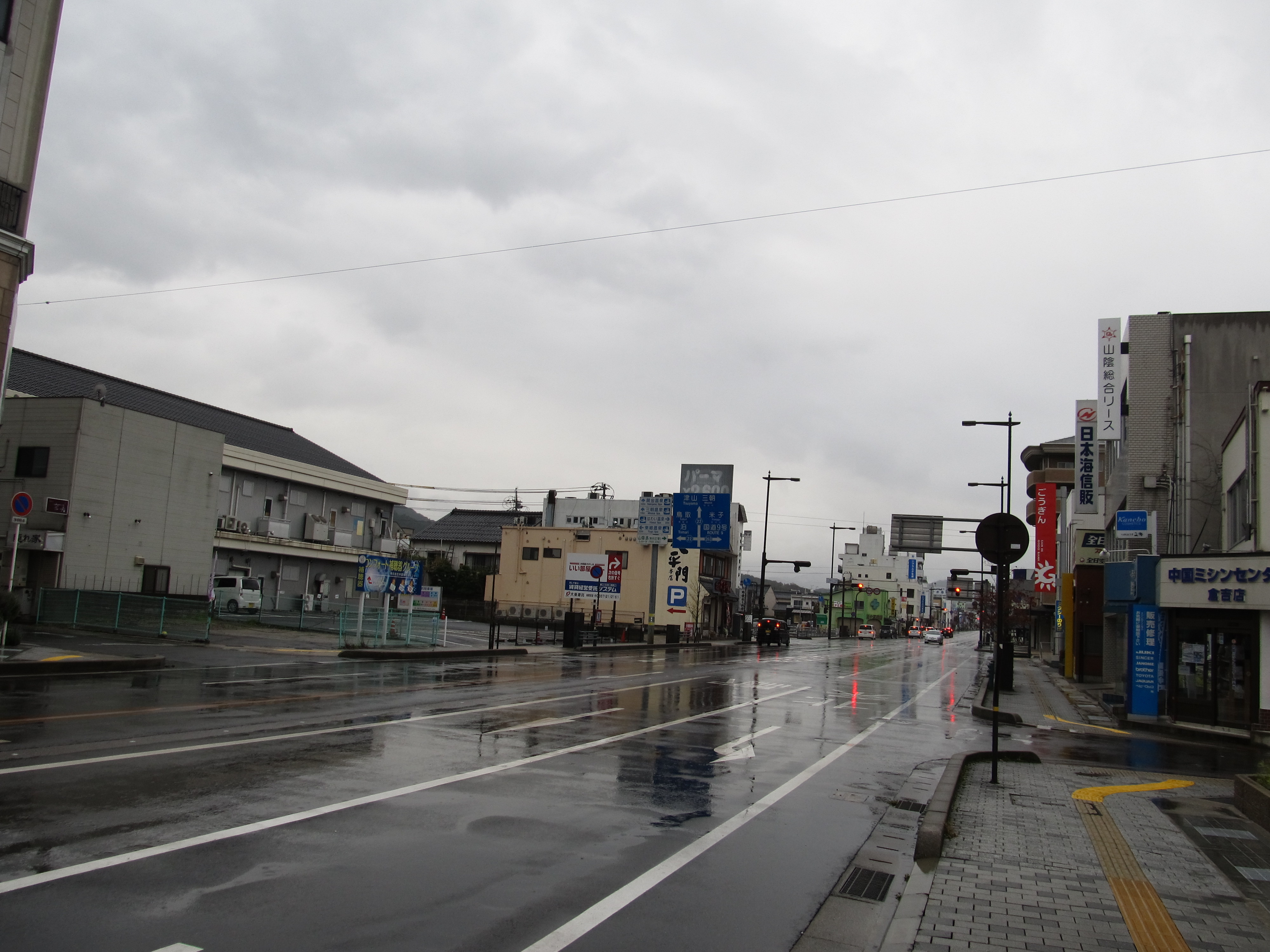 鳥取県道263号倉吉停車場線（倉吉駅前で撮影）。